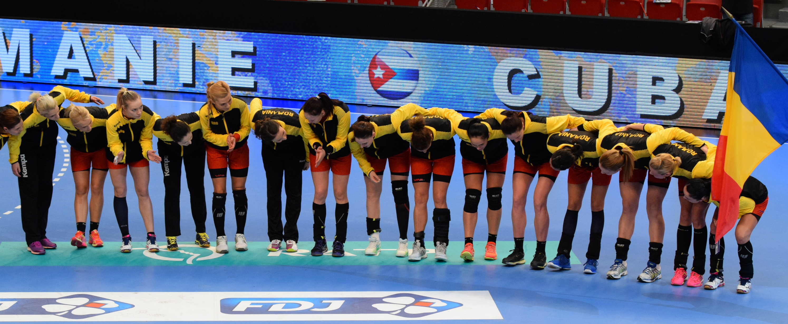 Equipe de Roumanie de handball féminin Le 29 novembre 2015, lors du match Roumanie / Cuba pour le compte du TIPIFF 2015. Au stade Pierre de Coubertin à Paris.